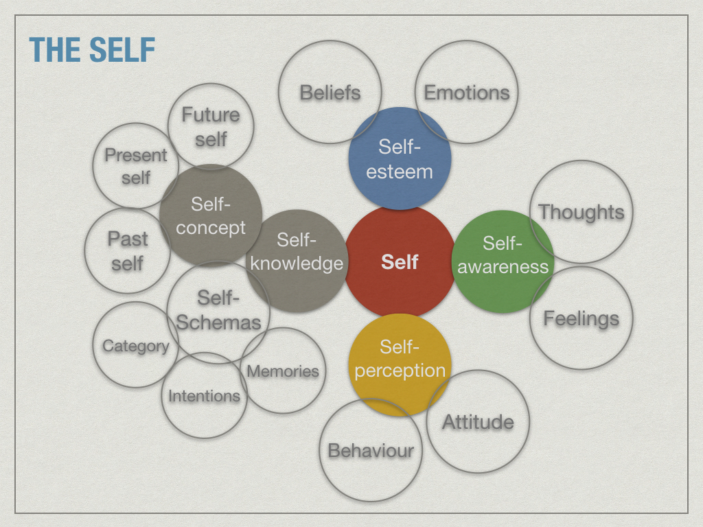 Dimensions and sub-dimensions of the Self.